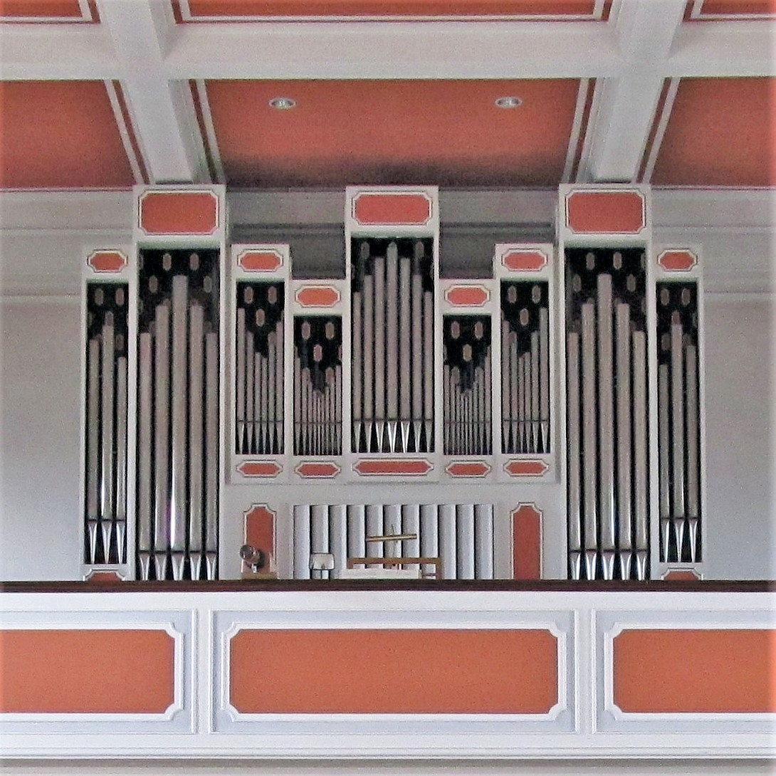 Blick vom Altarraum in Richtung Empore und Orgelprospekt der katholischen Pfarrkirche St. Martin in Medelsheim, Saarland